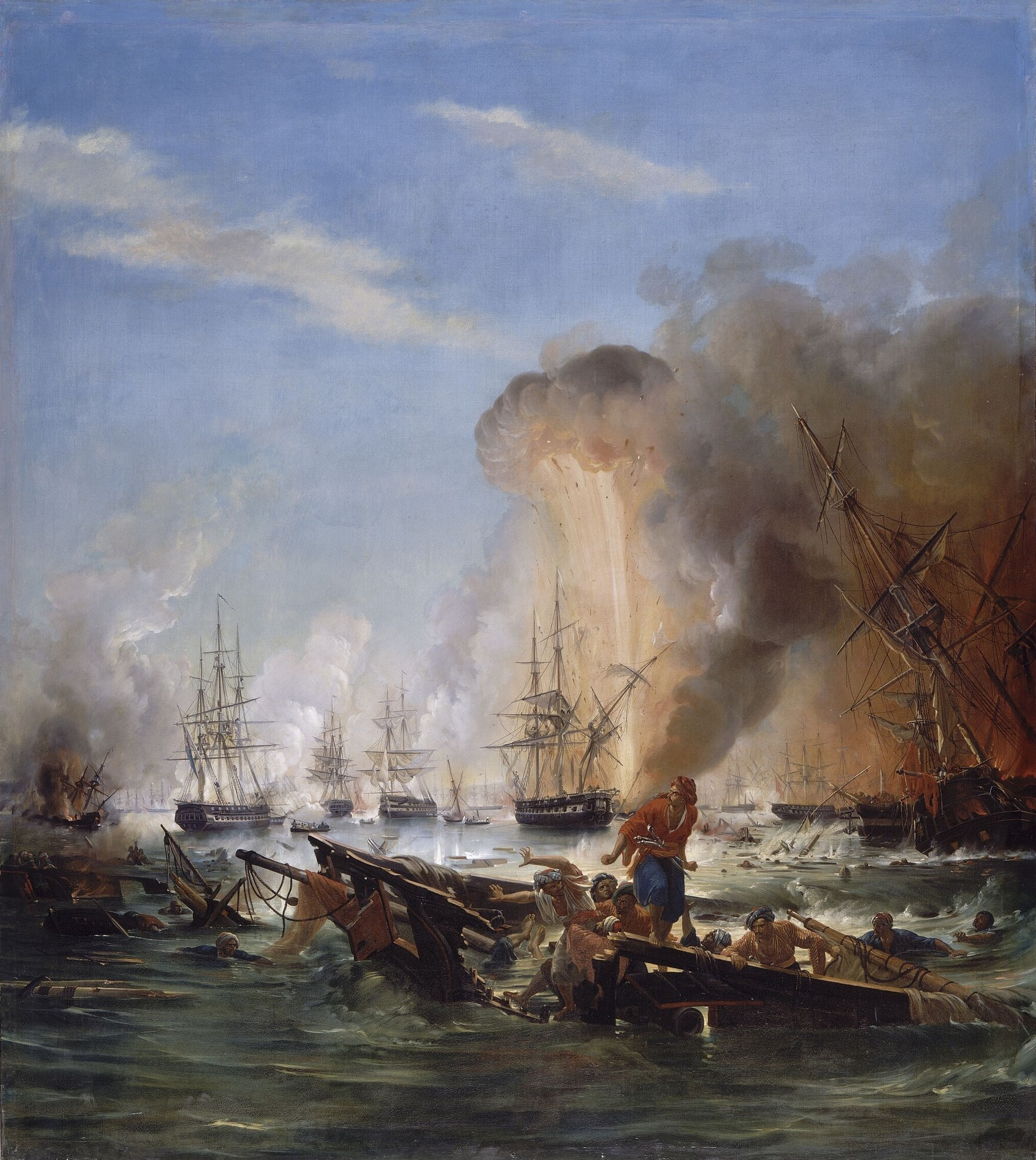 Bataille de Navarin, explosion de la frégate égyptienne L'Isonia, 20 octobre 1827. Guerre d'Indépendance de la Grèce. Copie d'un tableau de Jean-Charles Langlois. Dimensions : 177,8 x 158,6 cm. Cadre : 184,2 x 164,8 x 6,5 cm. Matière et technique : huile sur toile.